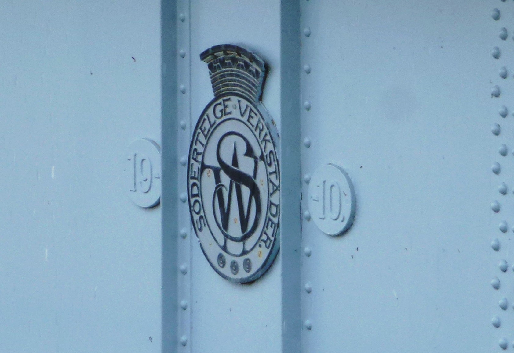 Stäketbron (svängbron) med Södertälje Verkstäders signum. Bron fanns fram till 1924 i Södertälje.